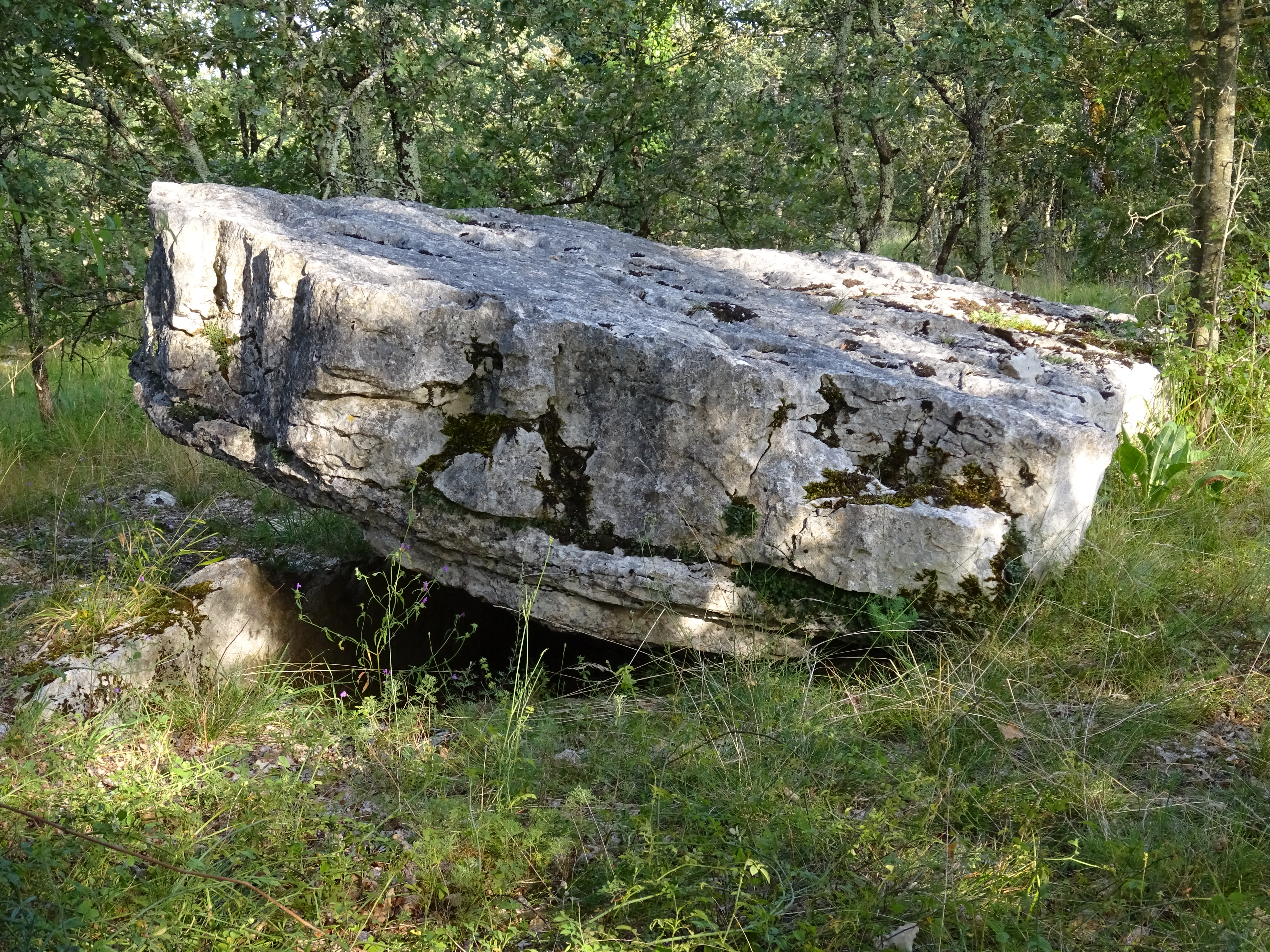 Dolmen de Fourques Basses à Brengues (Lot, France).